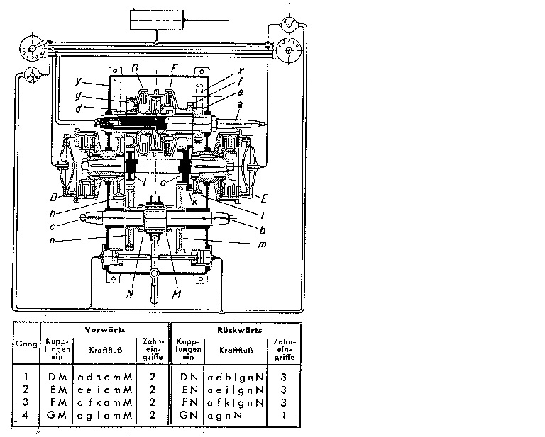 Prinzipskizze der Wirkungsweise des TAG-Getriebes